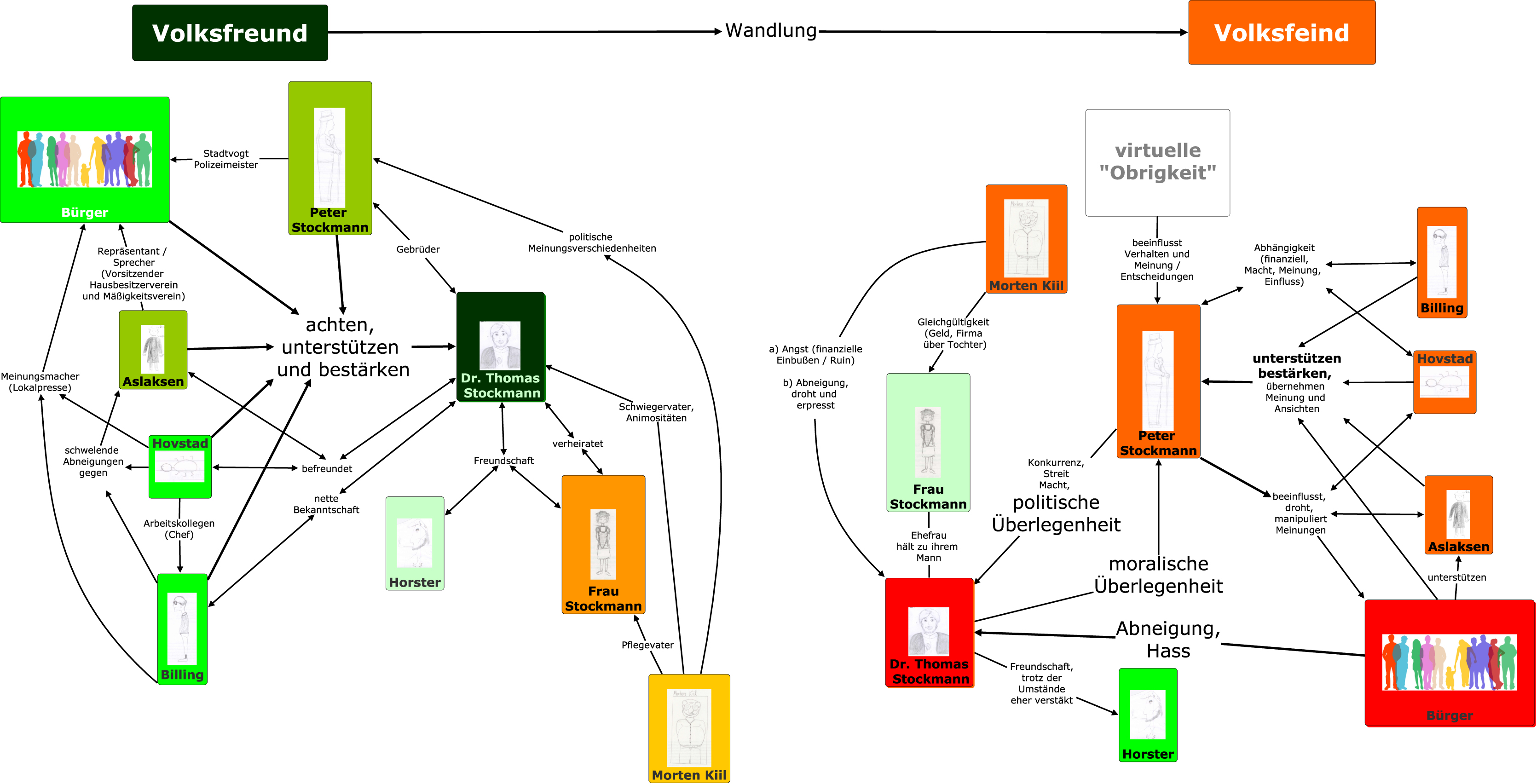 Figurenkonstellation in „Ein Volksfeind“ von Henrik Ibsen im Verlauf des Dramas. Vom Volksfreund zum Volksfeind.